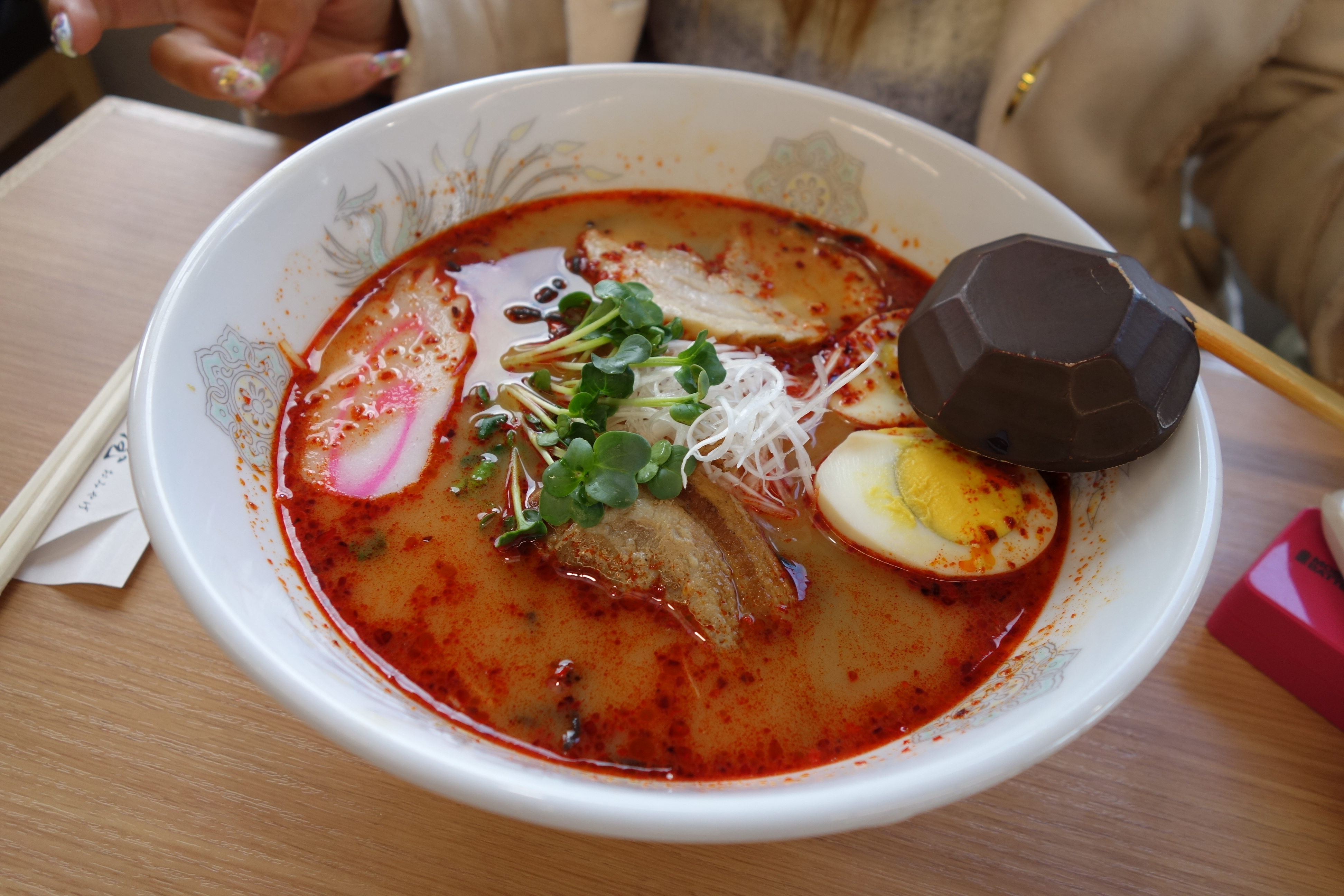 赤池地獄の黒ラーメン 1,000円 箱根大涌谷 極楽茶屋